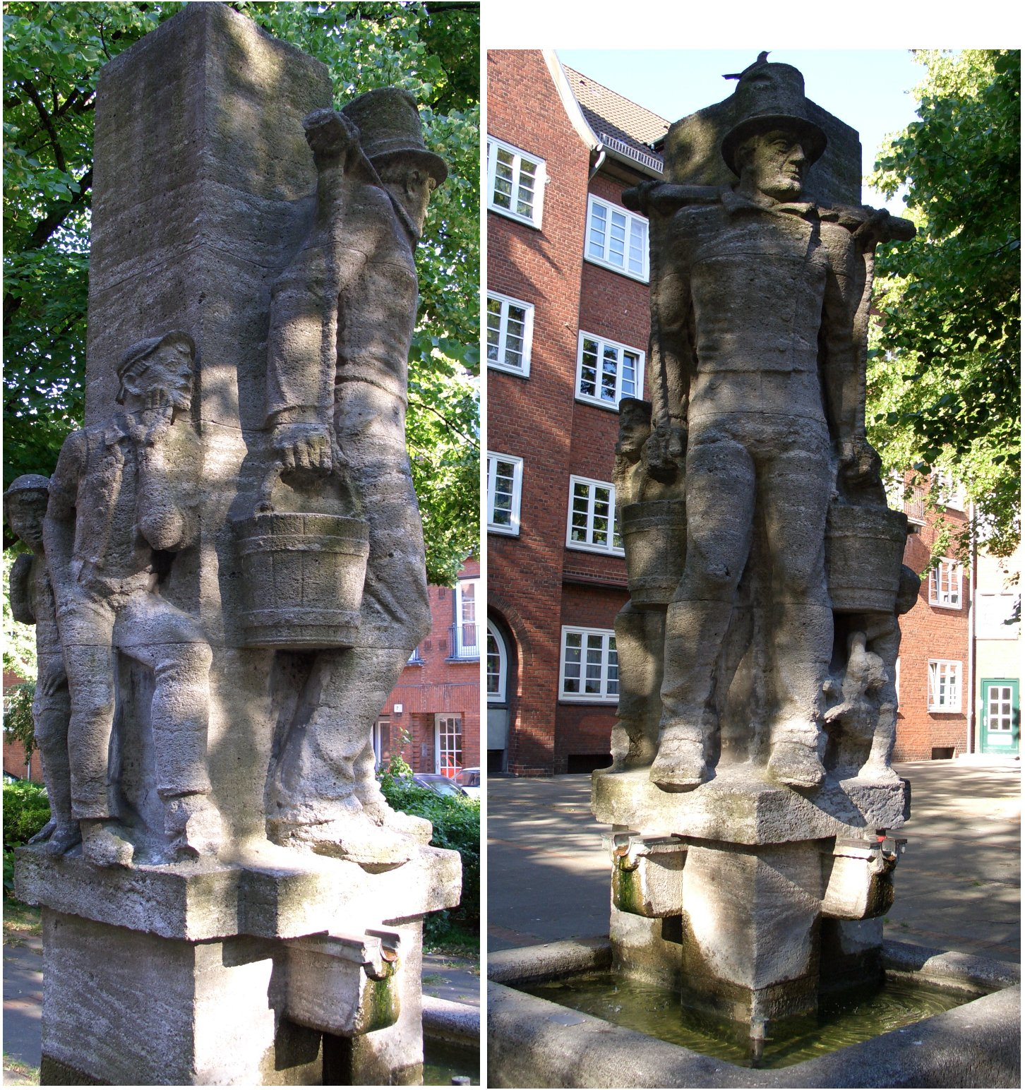 Hummelbrunnen in Hamburg am Rademachergang. This is a photograph of an architectural monument. Fotografiert am 23.6.2005 Lizenz: GNU Freie Dokumentationslizenz Habe ich selbst fotografiert.